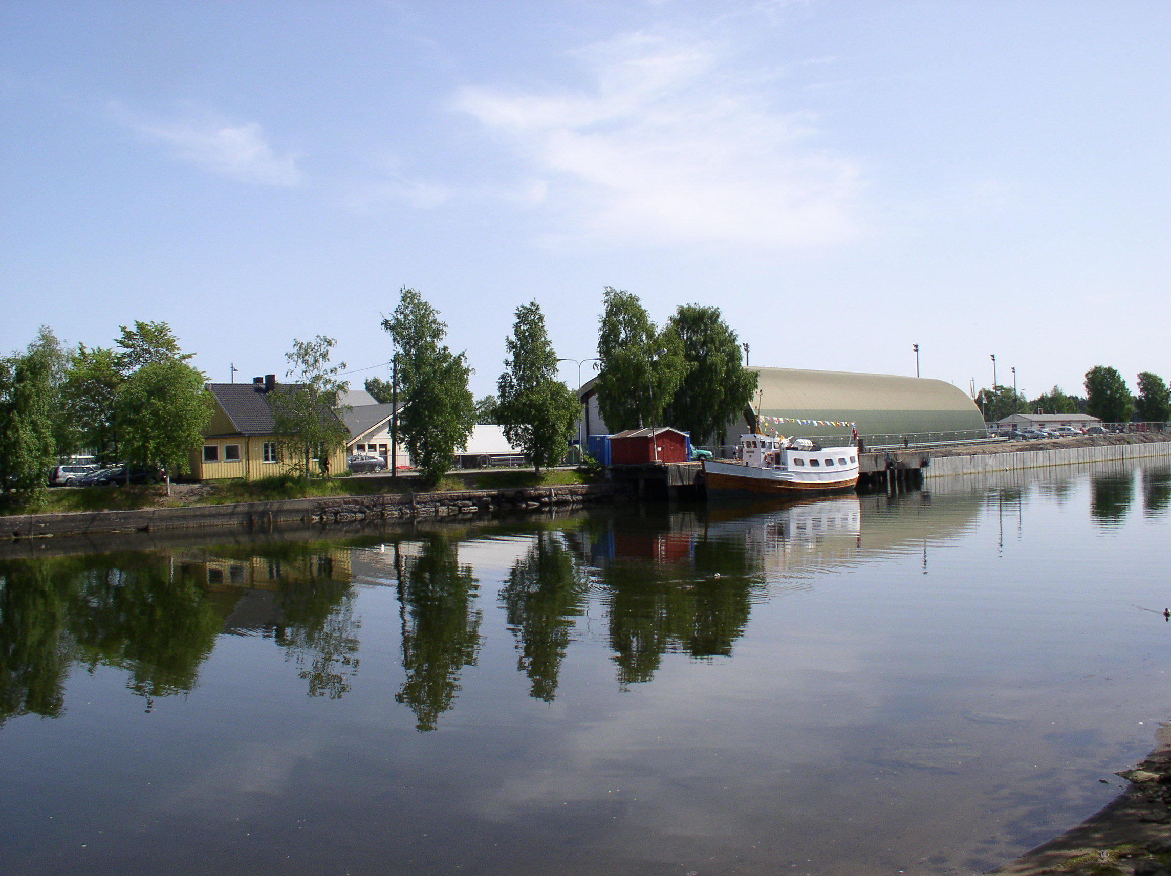 Rigfar ved Rigmorkaia på Kadettangen i Bærum